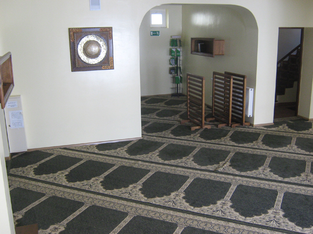 widok na część dla kobiet